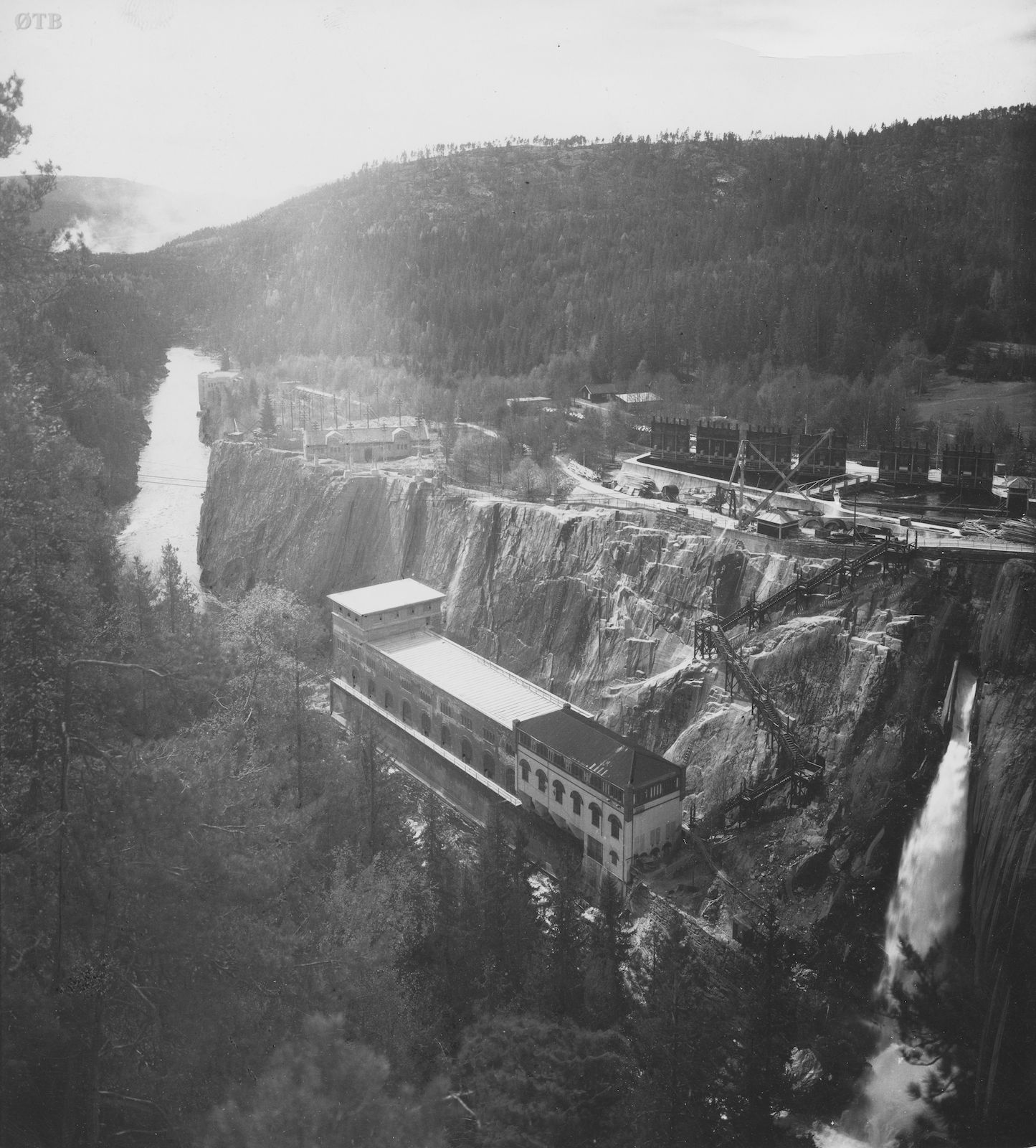 Kraftstasjon Svælgfos I. Svelgfoss I ble tegnet av arkitekt Henning Kloumann. Bygningen som var en av landets første bygg oppført i armert betong er nå revet.